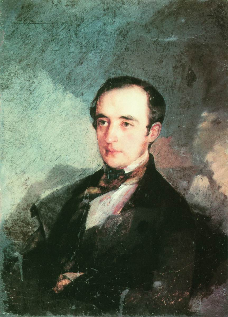 Портрет неизвестного в синем сюртуке (В.Ф. Одоевский) 1840-е